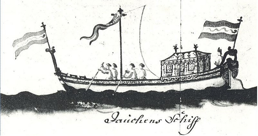 Schaluppe des Joachim Daniel von Jauch für Fahrten auf der Weichsel